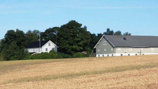 Flagstad Østre sett fra jordet.